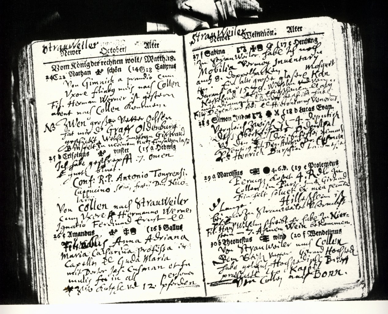 Tagebuchaufzeichnungen des Johann Adolf Wolff Metternich, 17.Jahrhundert